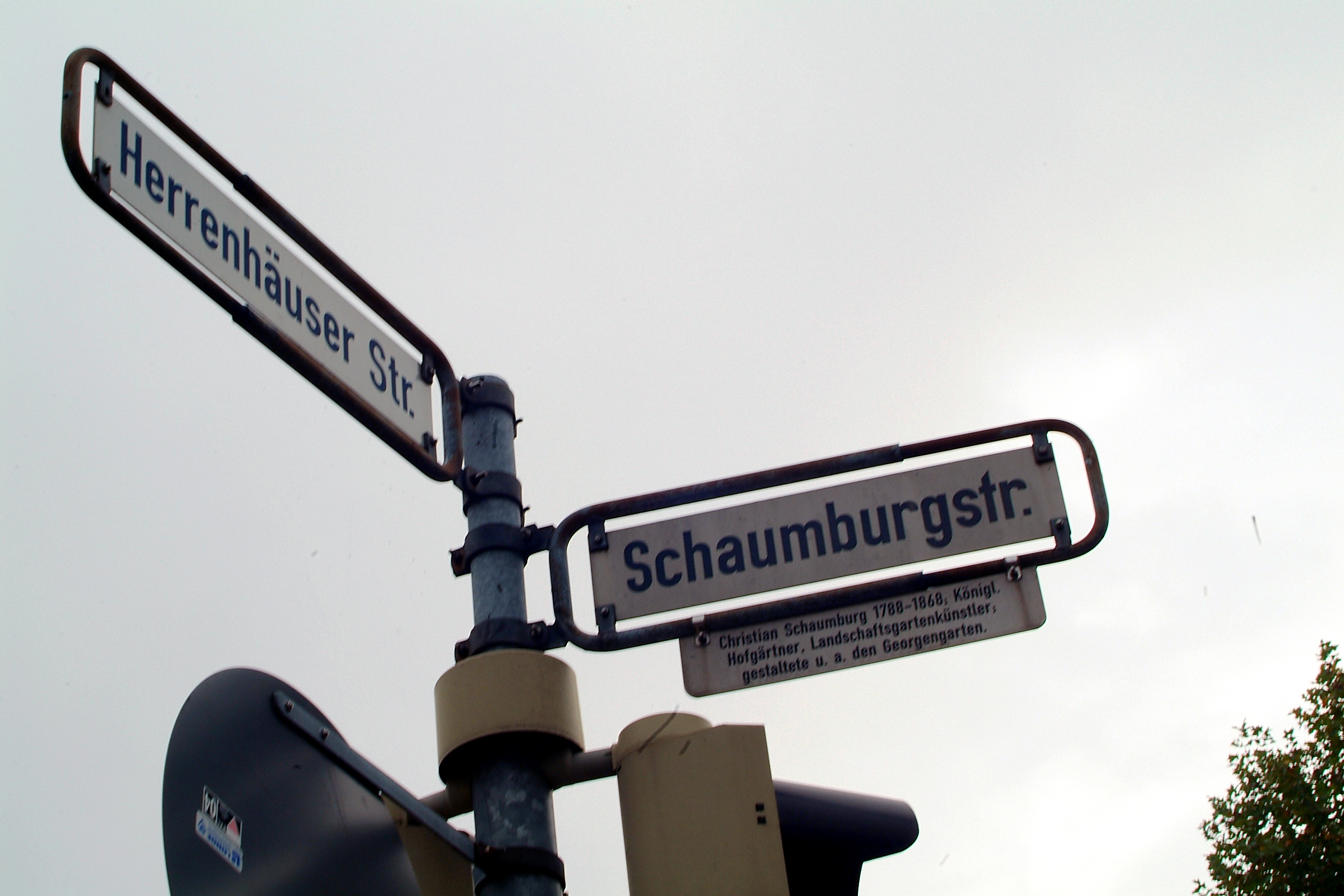 Straßenschild "Schaumburgstraße" mit einer gesondert angebrachten Tafel zu Christian Schaumburg, königlicher Hofgärtner und Landschaftsgartenkünstler, der unter anderem den Georgengarten gestaltete